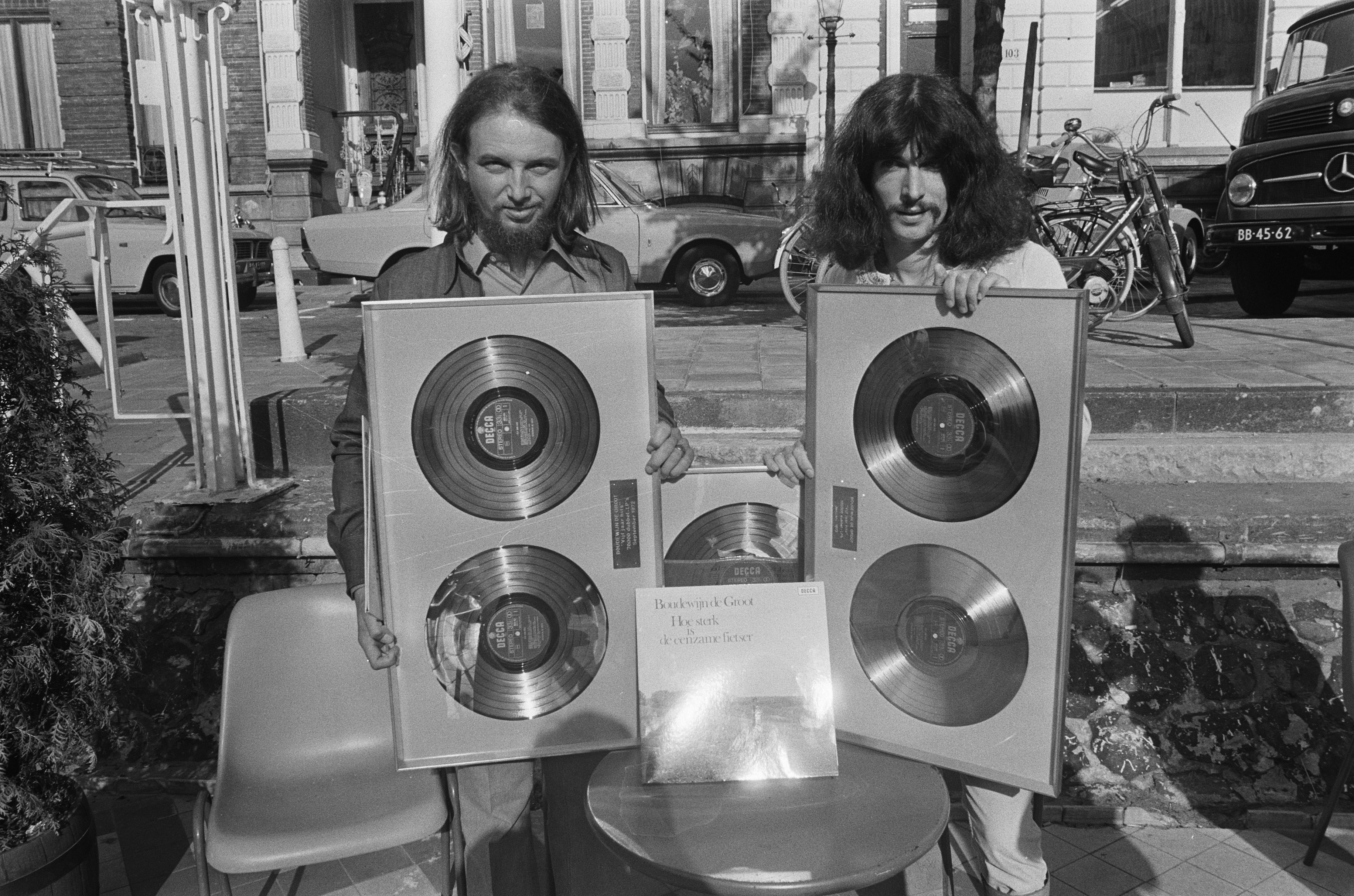 Boudewijn de Groot (rechts) en tekstschrijver Lennaert Nijgh met platina platen voor de elpee Hoe sterk is de eenzame fietser; noot: op de labels bij de platina platen is duidelijk de tekst "Vijf jaar hits 70.000 dubbel-LP's September 1972" (Nijgh) en "Vijf jaar hits 100.000 dubbel-LP's Januari 1973" (De Groot) te lezen; van Hoe sterk is de eenzame fietser is hier slechts de elpeehoes in beeld. De getoonde platina/gouden platen waren eerder uitgereikte platen. Die voor Hoe sterk is de eenzame fietser werd later uitgereikt. Zie dit overzicht.